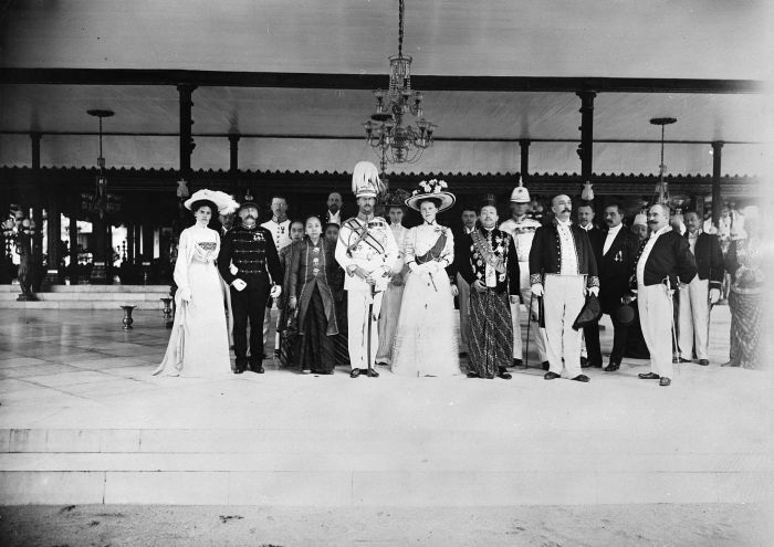 Foto. Groepsportret tijdens een bezoek van Hertog Johann Albrecht van Mecklenburg, tevens regent van het hertogdom Brunswijk, aan Pakoe Boewono X, de Susuhunan van Solo